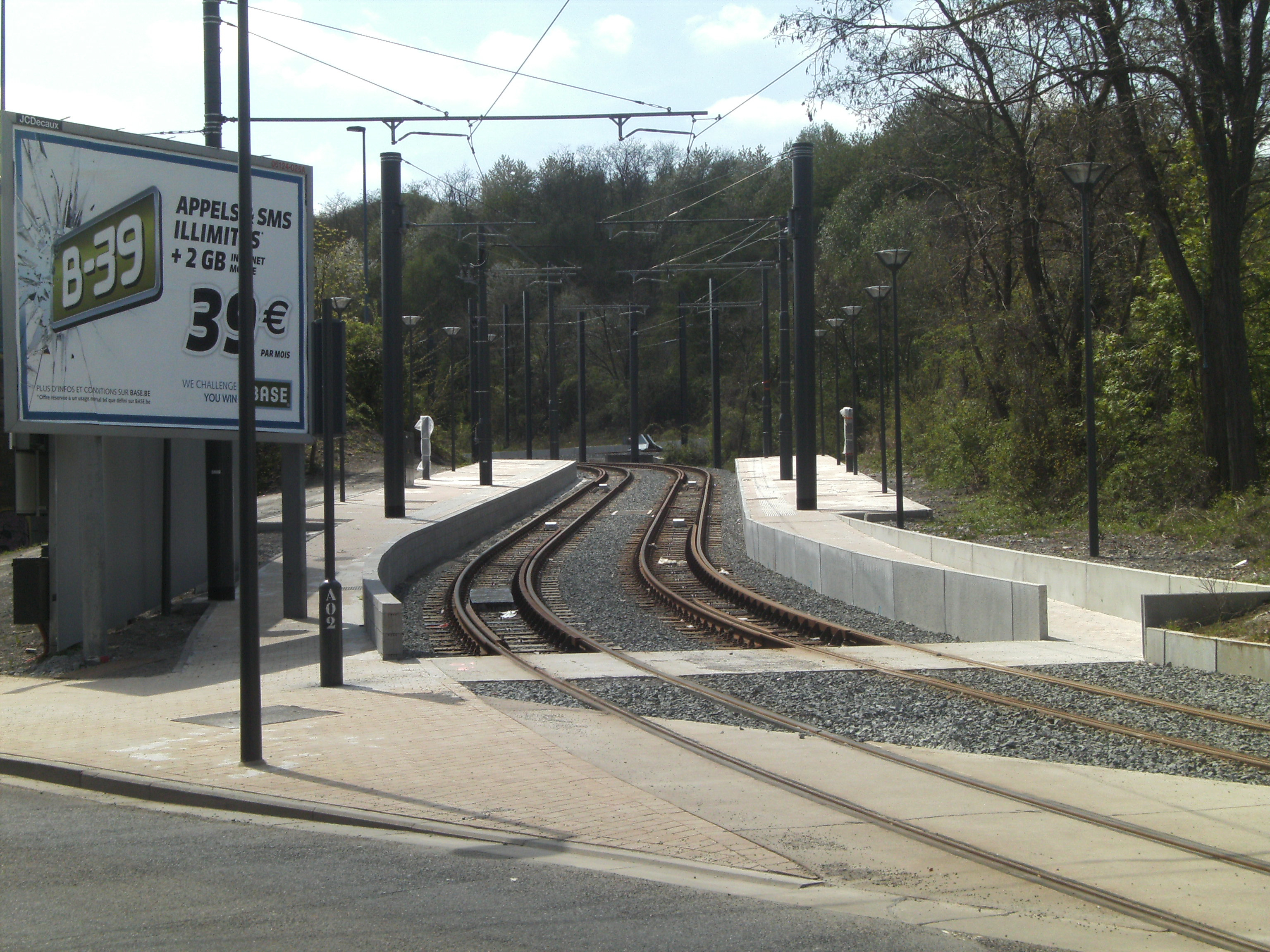 Sacré Madame metro station (Charleroi)